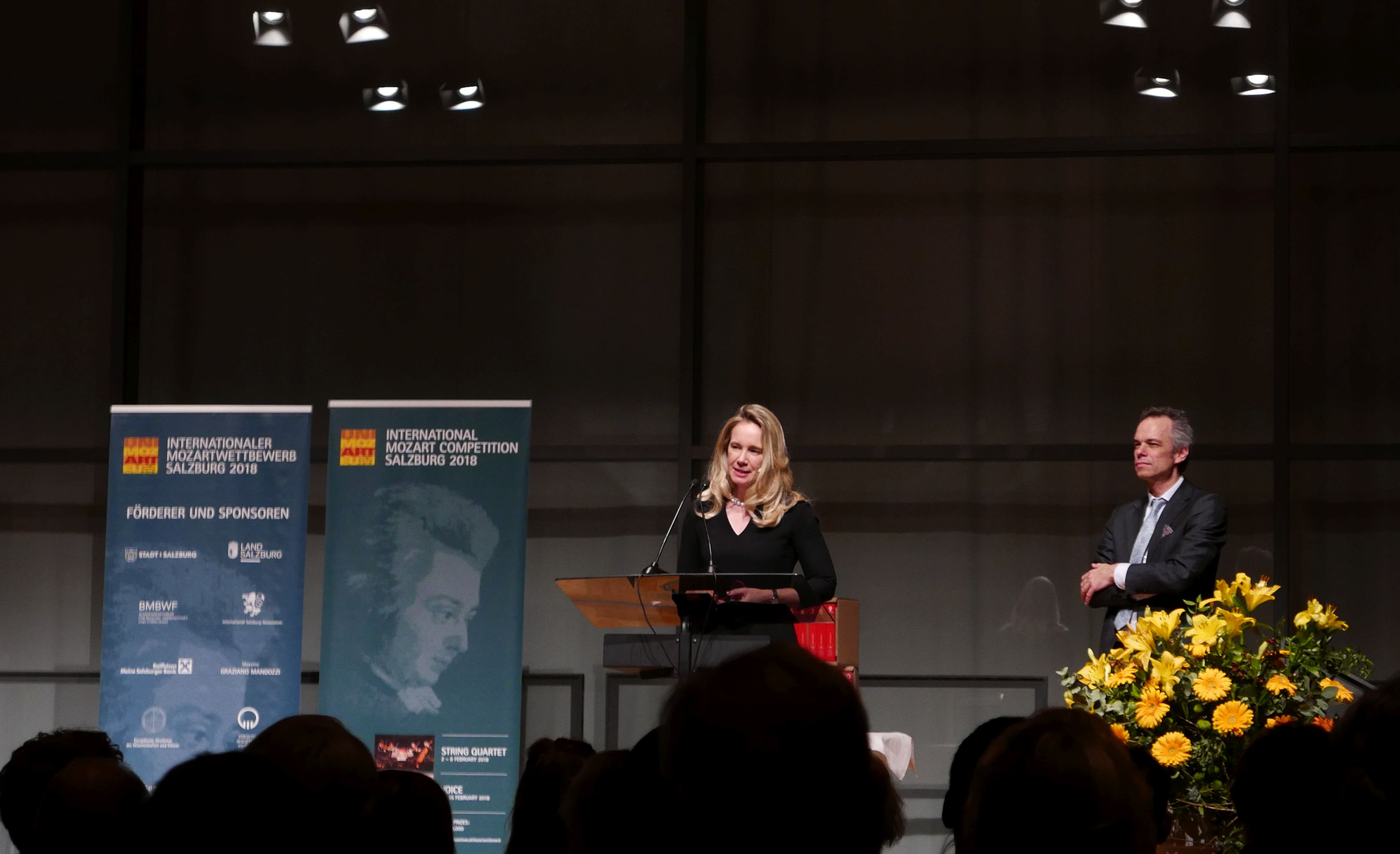 Internationaler Mozartwettbewerb 2018 Streichquartett Preisverleihung: Laudatio Sarah Wedl-Wilson (Interims. Rektorin Universität Mozarteum